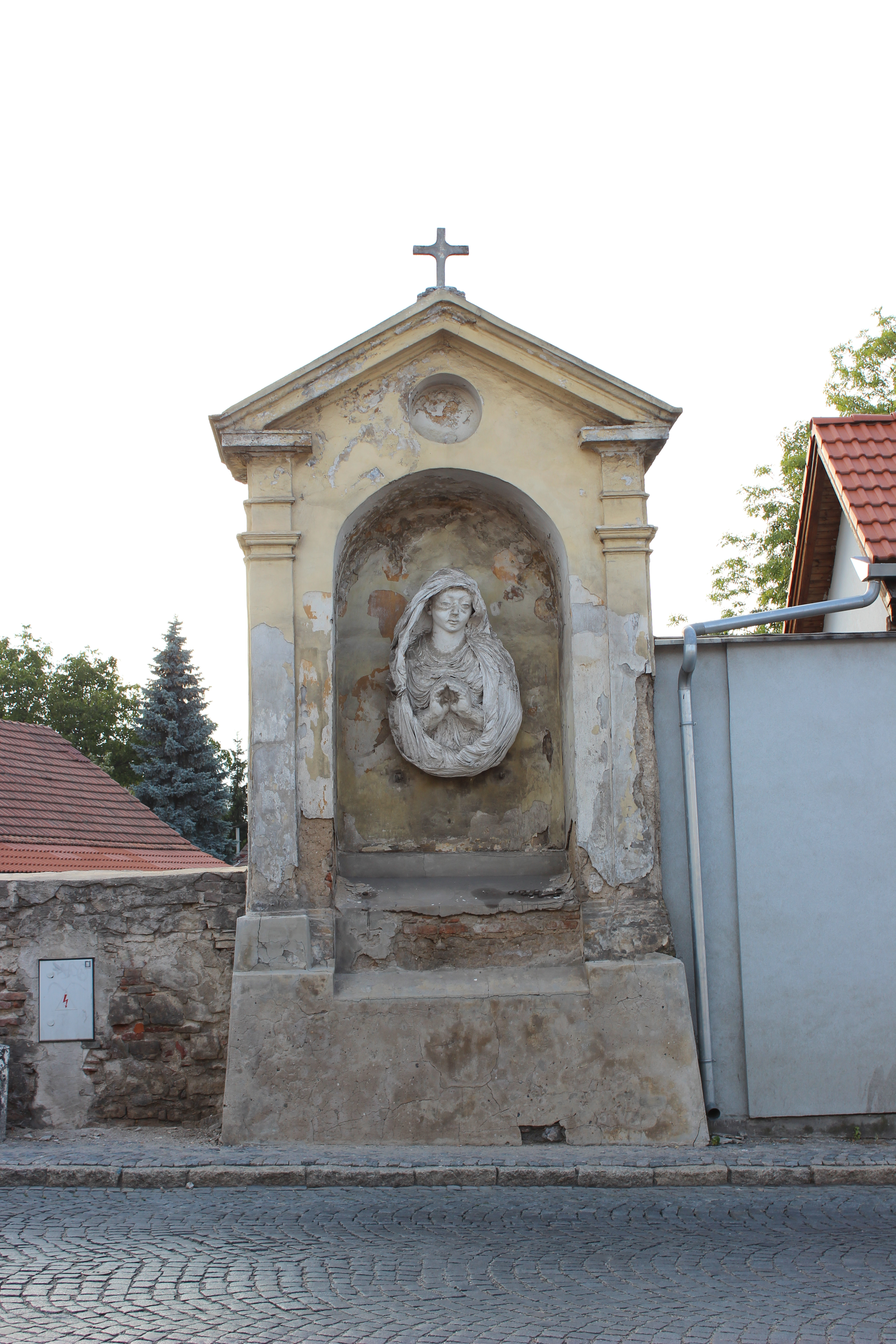 Kaplička (součást křížové cesty) u brandýského nádraží (pohled z Pražské ulice).